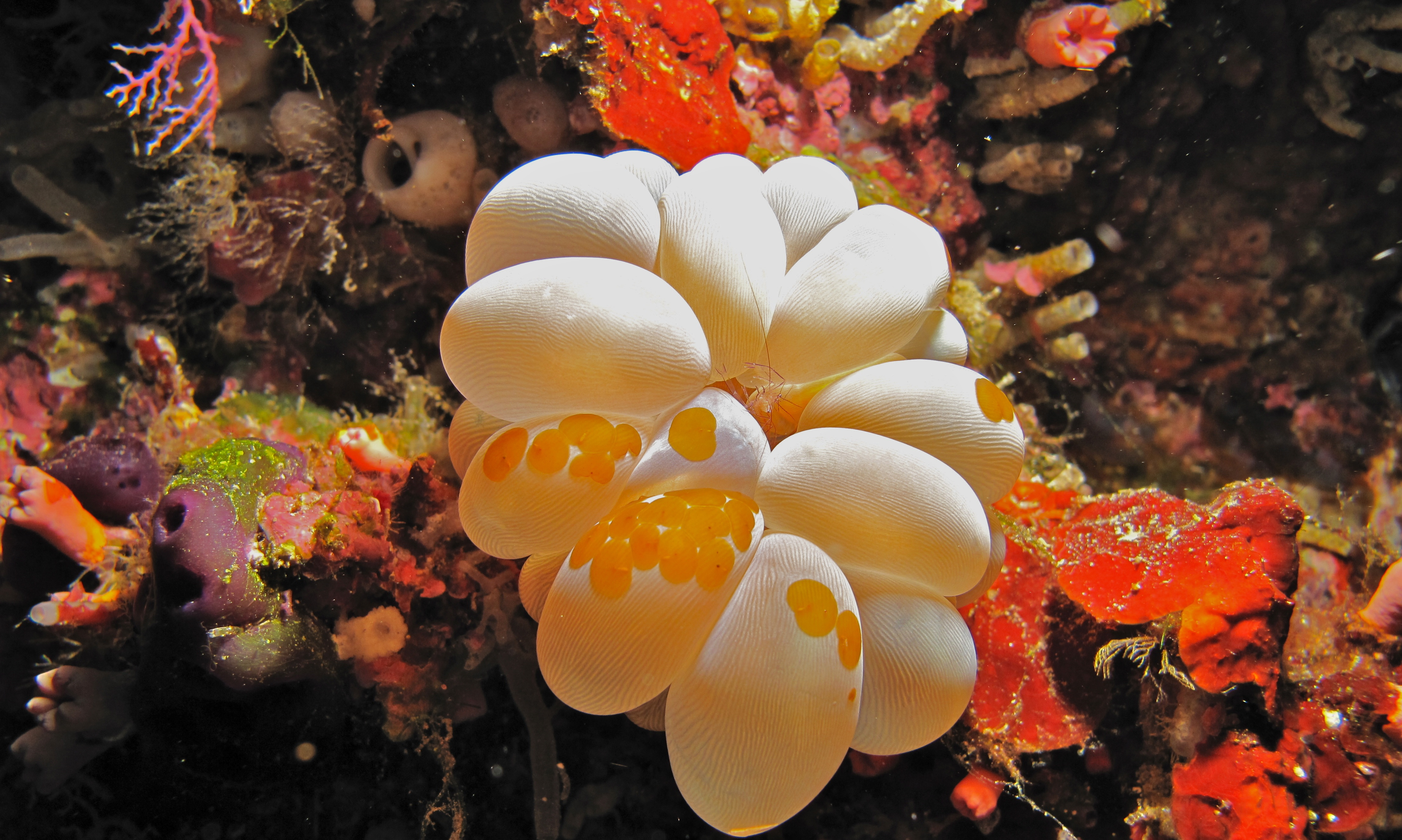 Alungbanua, Bunaken Island, Sulawesi, INDONESIA